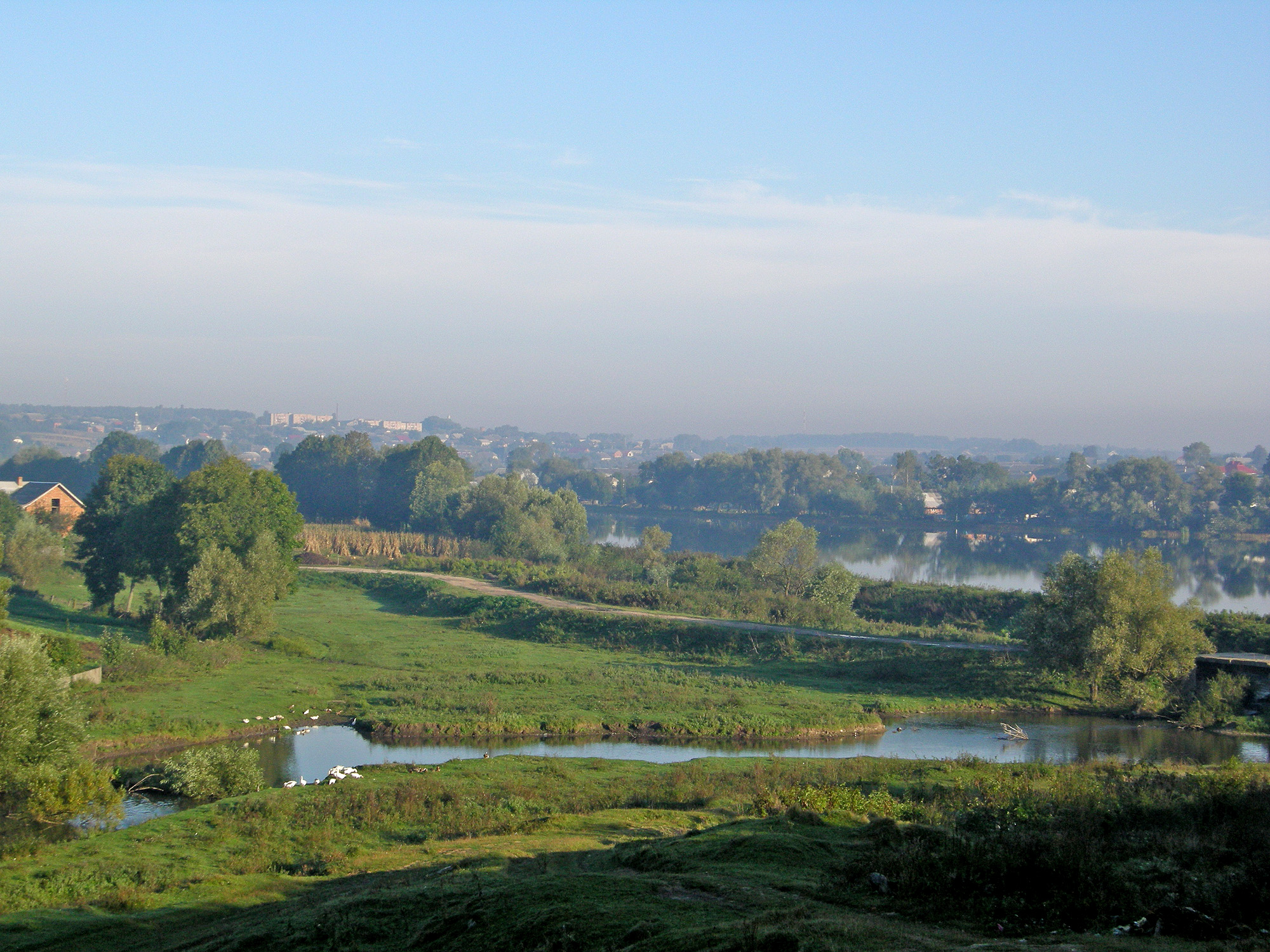 Вигляд на село Трибухівці і долину річки Вільховець (Бучацький район Тернопільської області, Україна).